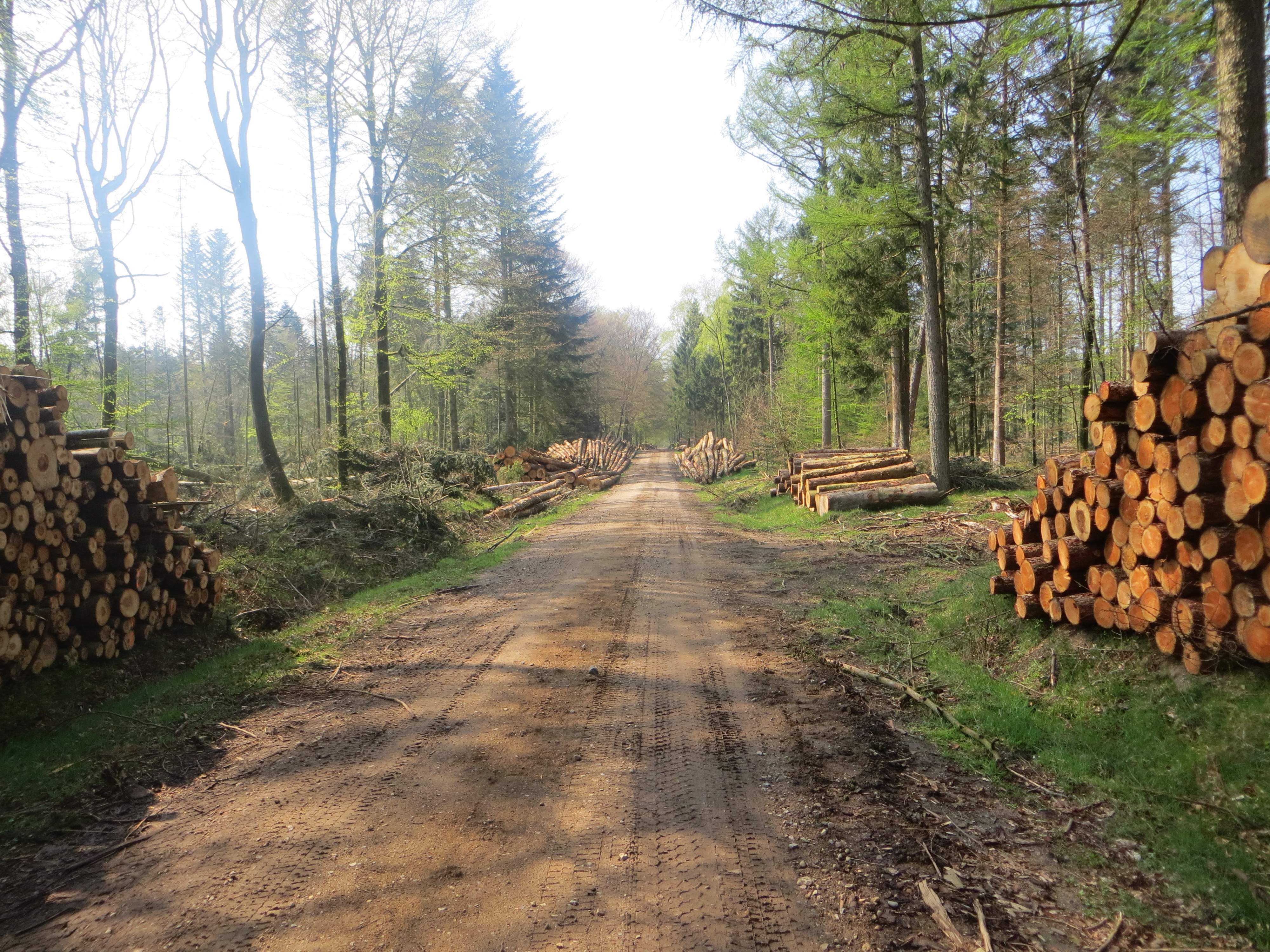 Handewitter Forst 2014, Hauptweg nach dem Sturm Xaver